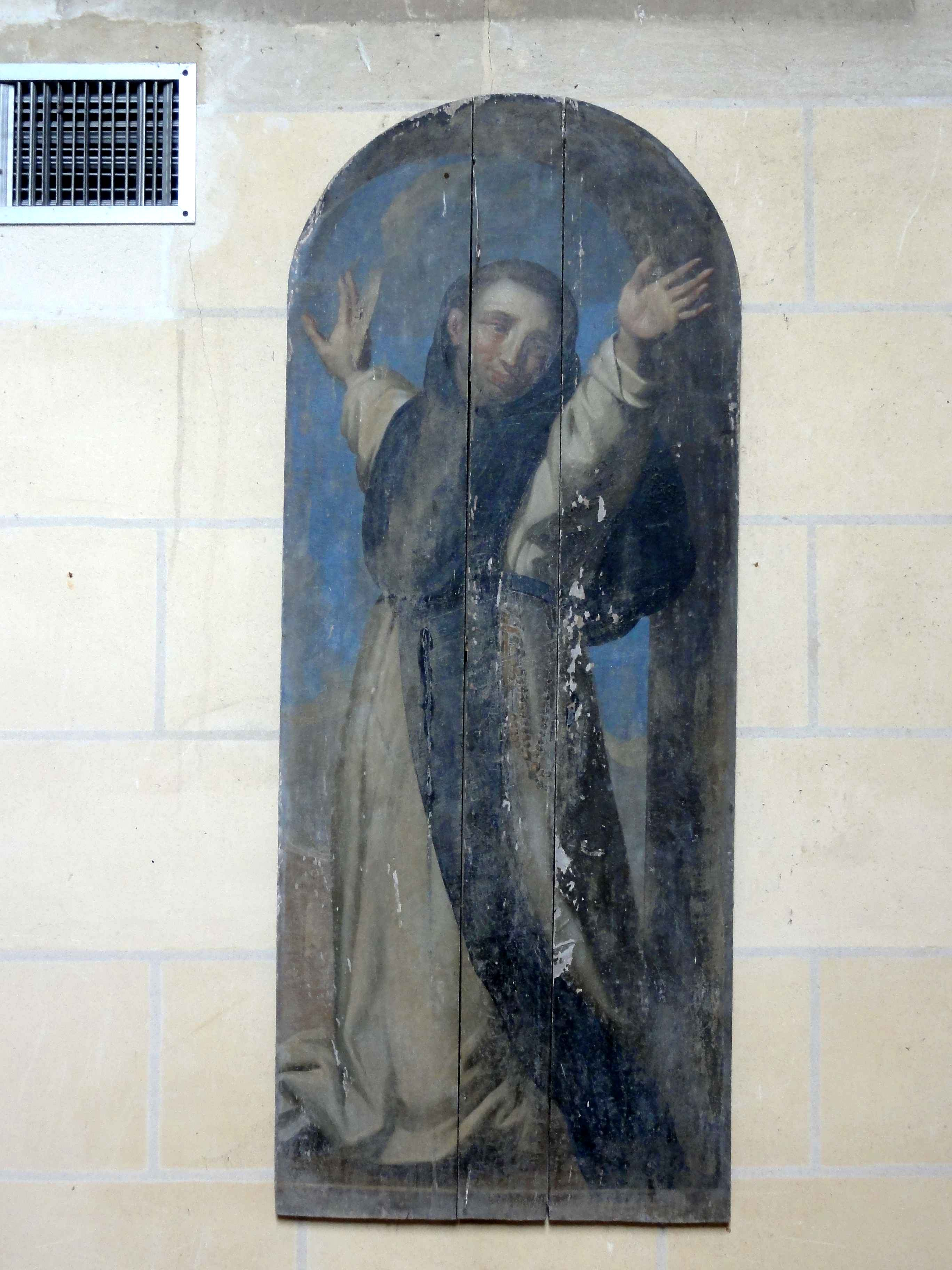 Mobilier de l'église (voir titre).